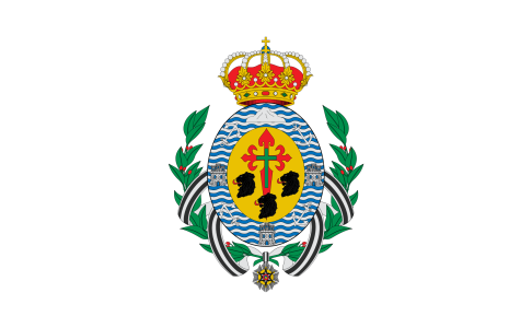 Bandera de Santa Cruz de Tenerife, España